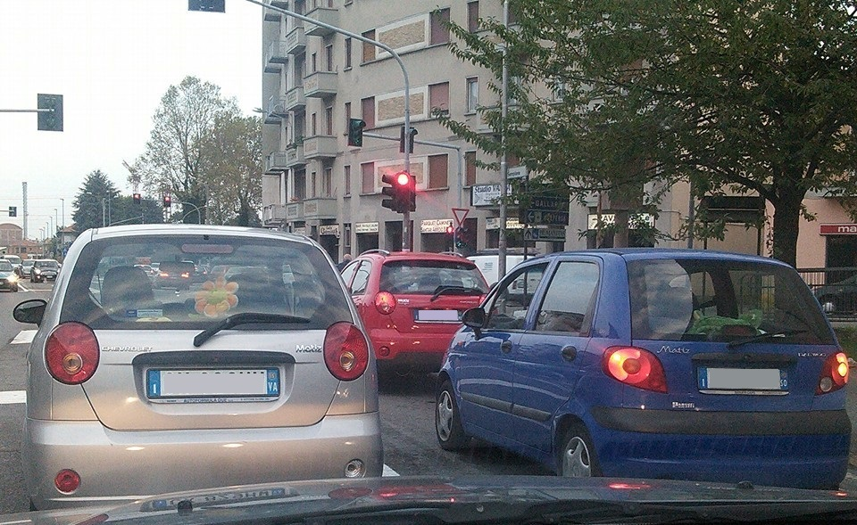 Matiz M100, M250 and M150